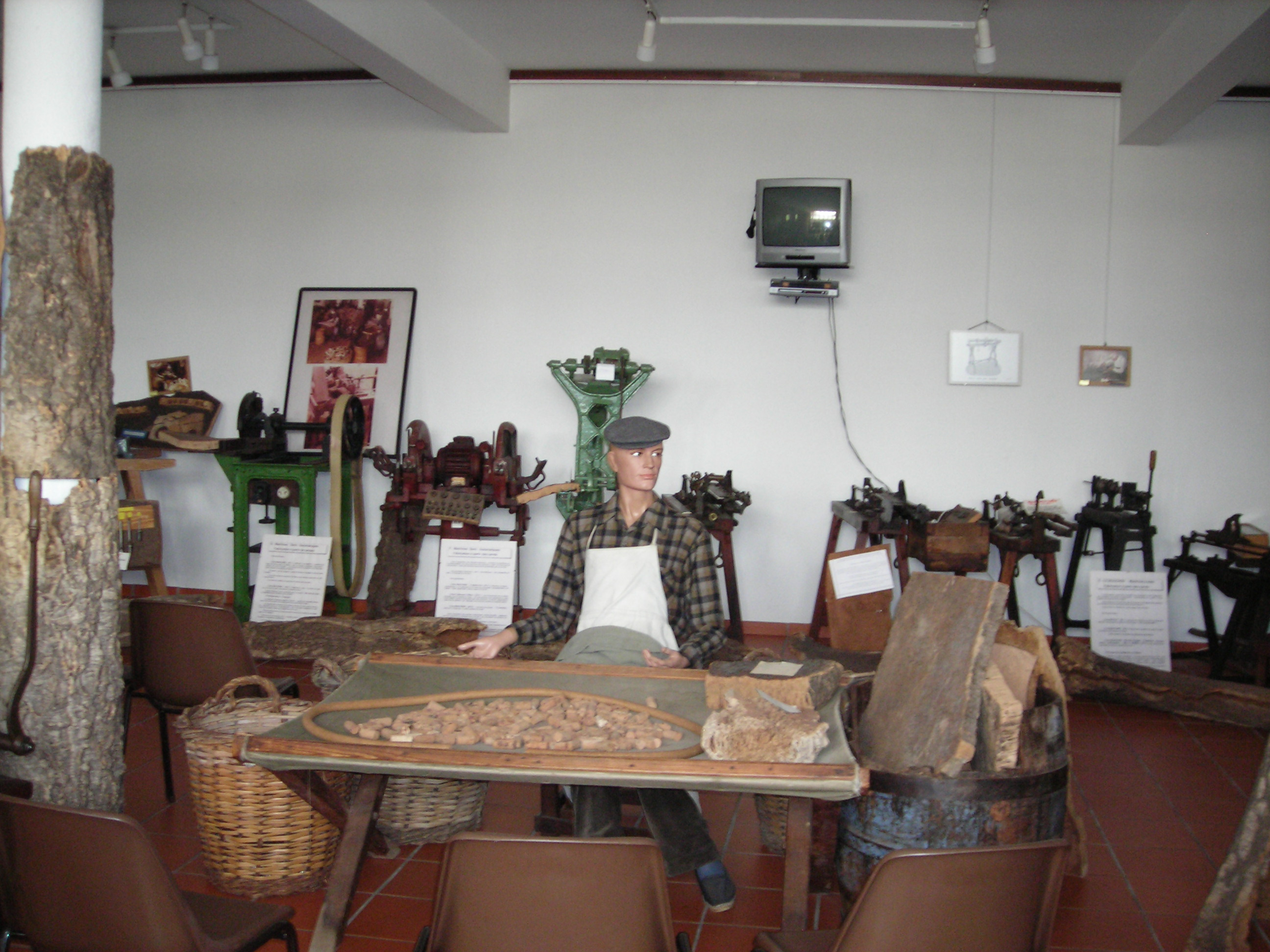 salle à l'intérieur du musée